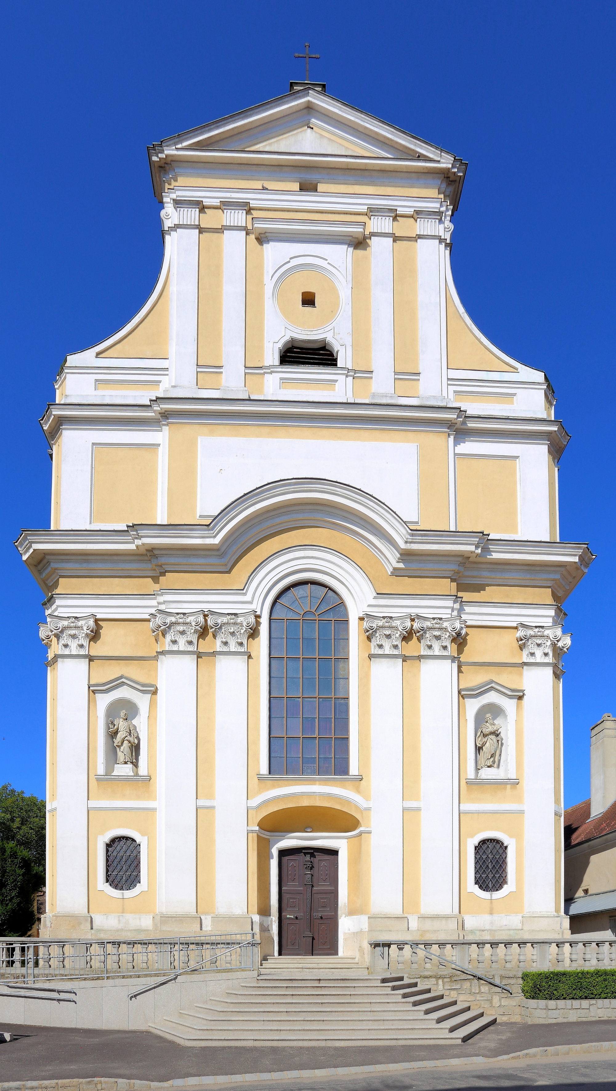 Ostfassade der katholischen Pfarrkirche Mariae Himmelfahrt in Straning, ein Ortsteil der niederösterreichischen Marktgemeinde Straning-Grafenberg. Ein nach Plänen von Leopold Wißgrill in den Jahren 1737–1752 errichteter Sakralbau.